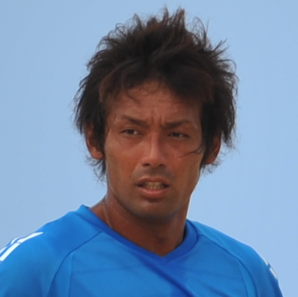 Beach Soccer Player